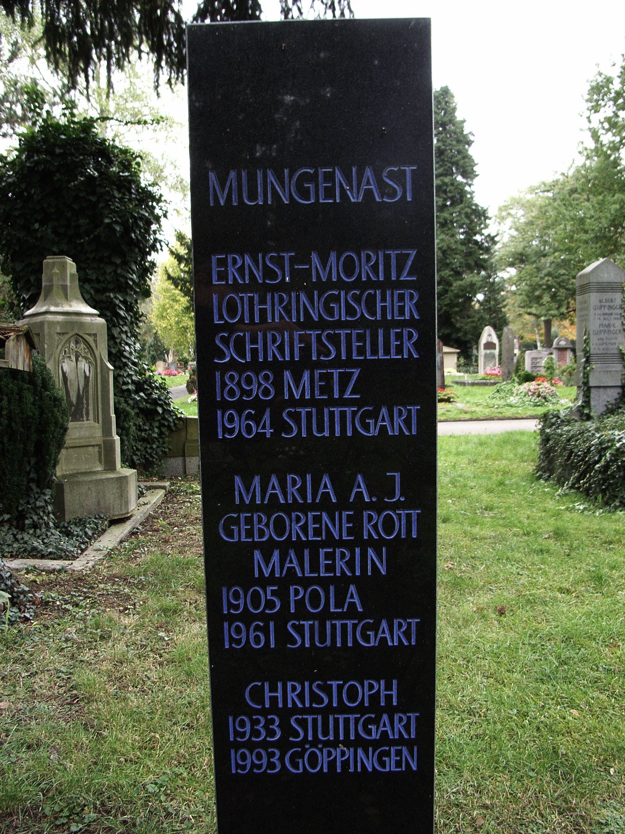 Dieses Bild zeigt den Grabstein von Ernst Moritz Mungenast in Stuttgart.